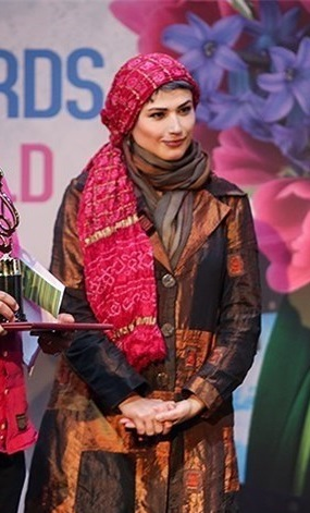 لادن مستوفی